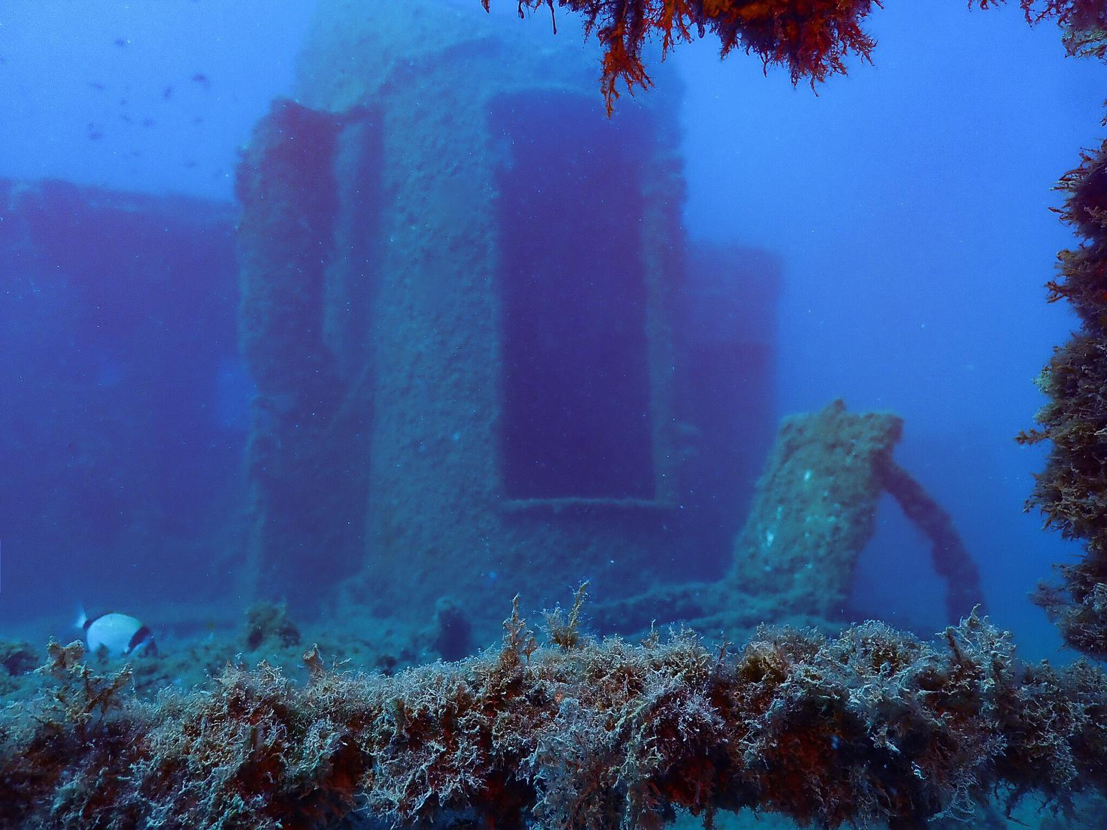 Foto torreta de popa La Dragonera